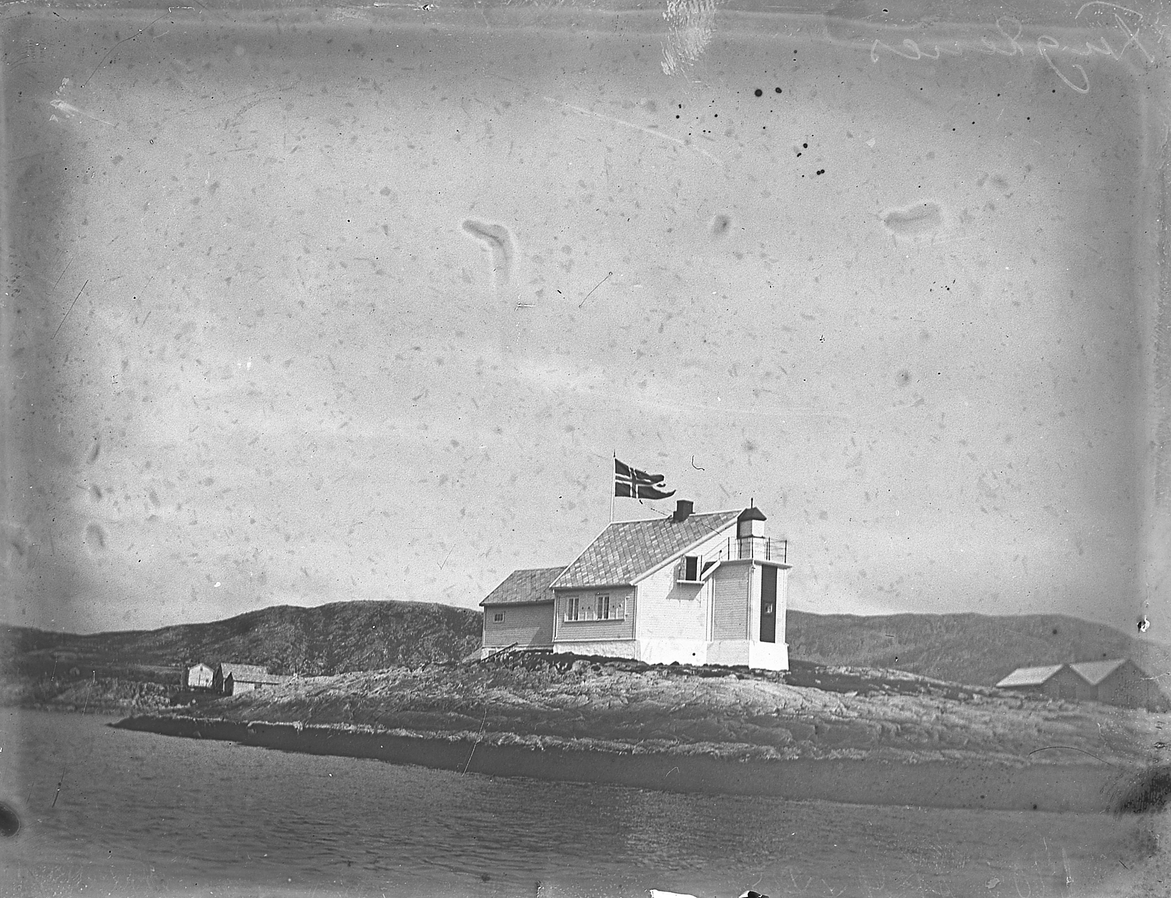 Bildet er hentet fra Arkivverket. Fuglenes, Hammerfest, Finnmark Arkivinstitusjon : Riksarkivet Arkivnavn : Fyrdirektoratet Sted : Norge, Finnmark, Hammerfest, Fuglenes Emneord: Fyr, Kyst Avbildet